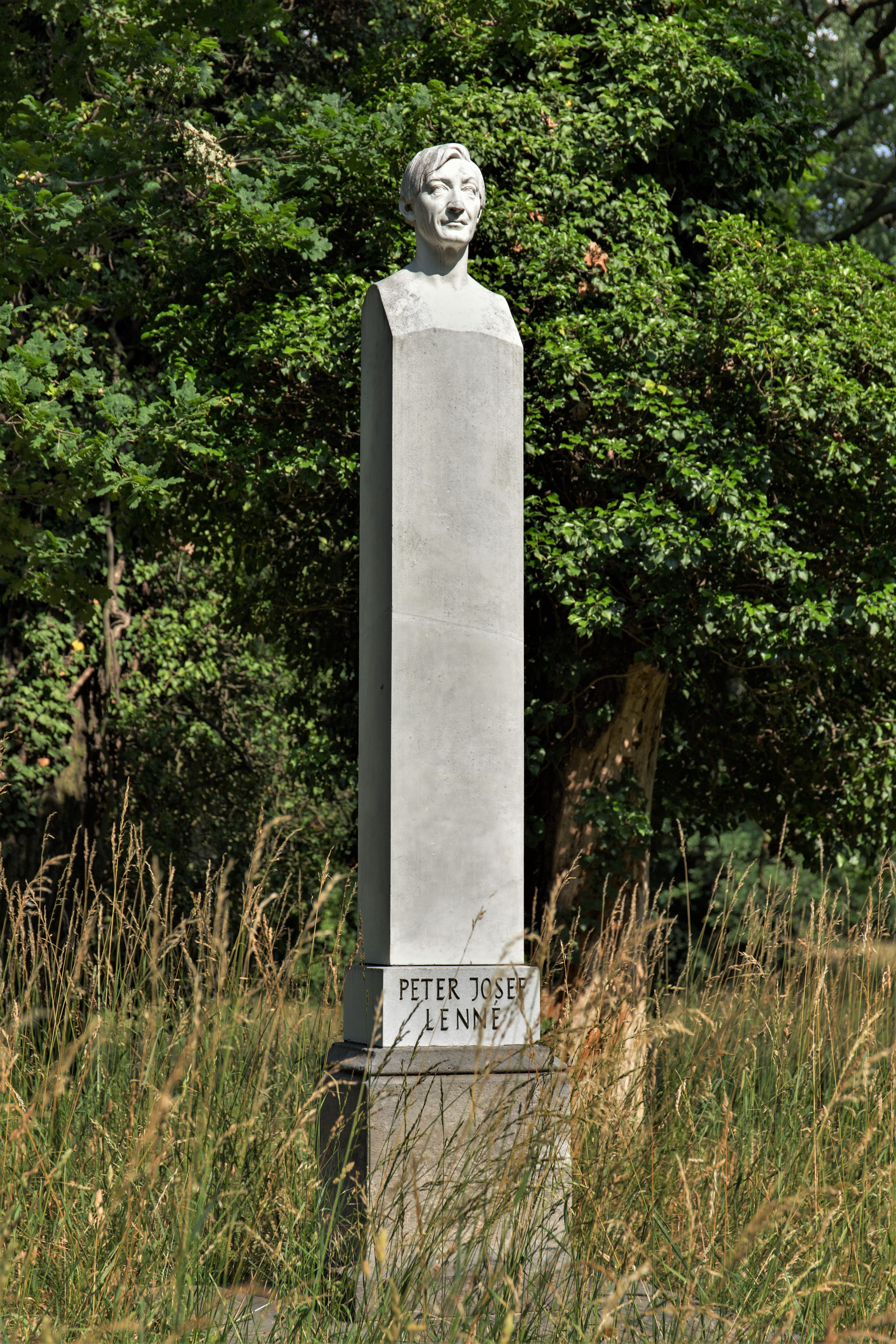 KulTour Parkanlage Sanssouci Peter Joseph Lenné